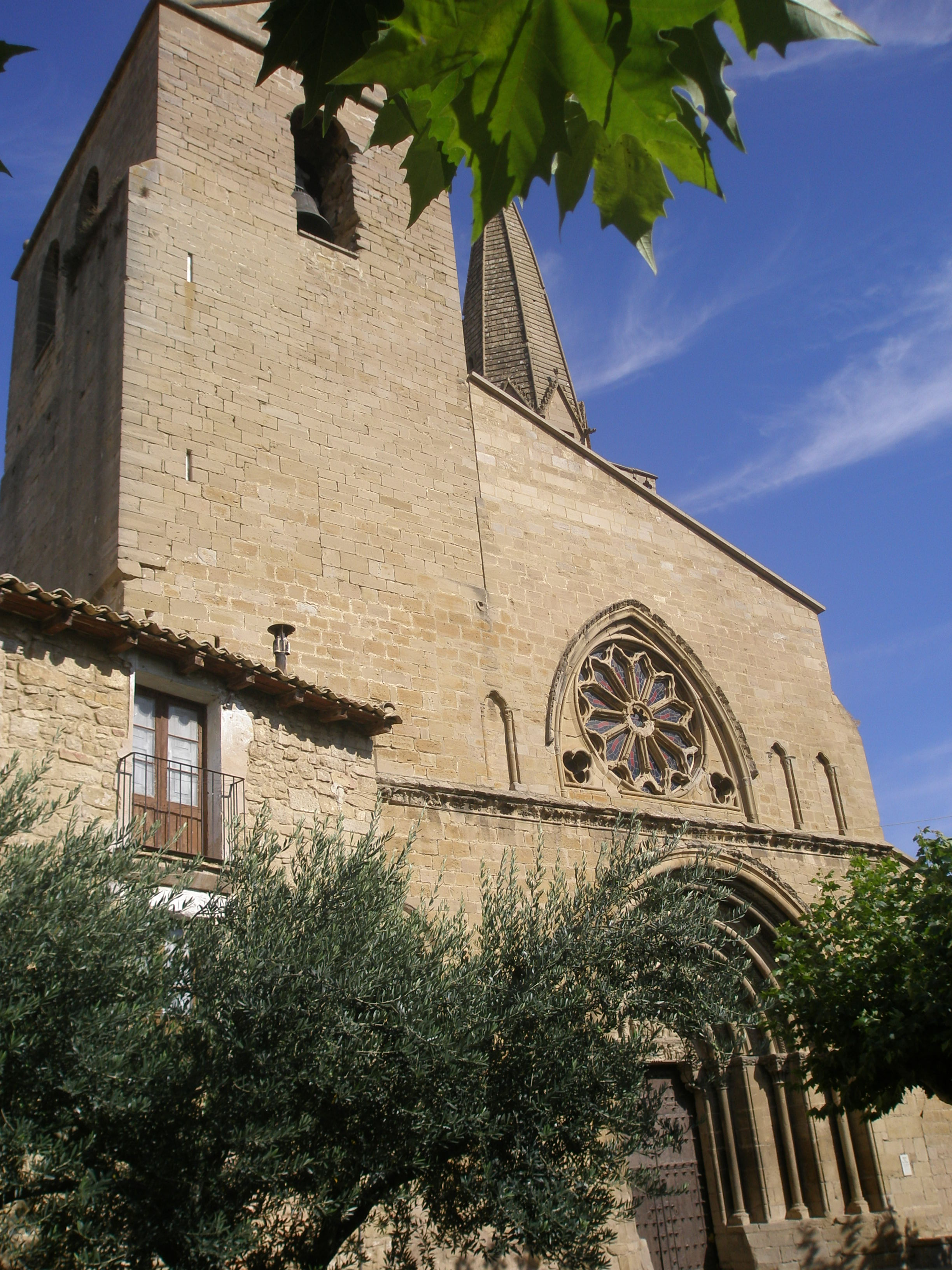 Iglesia de San Pedro de Olite